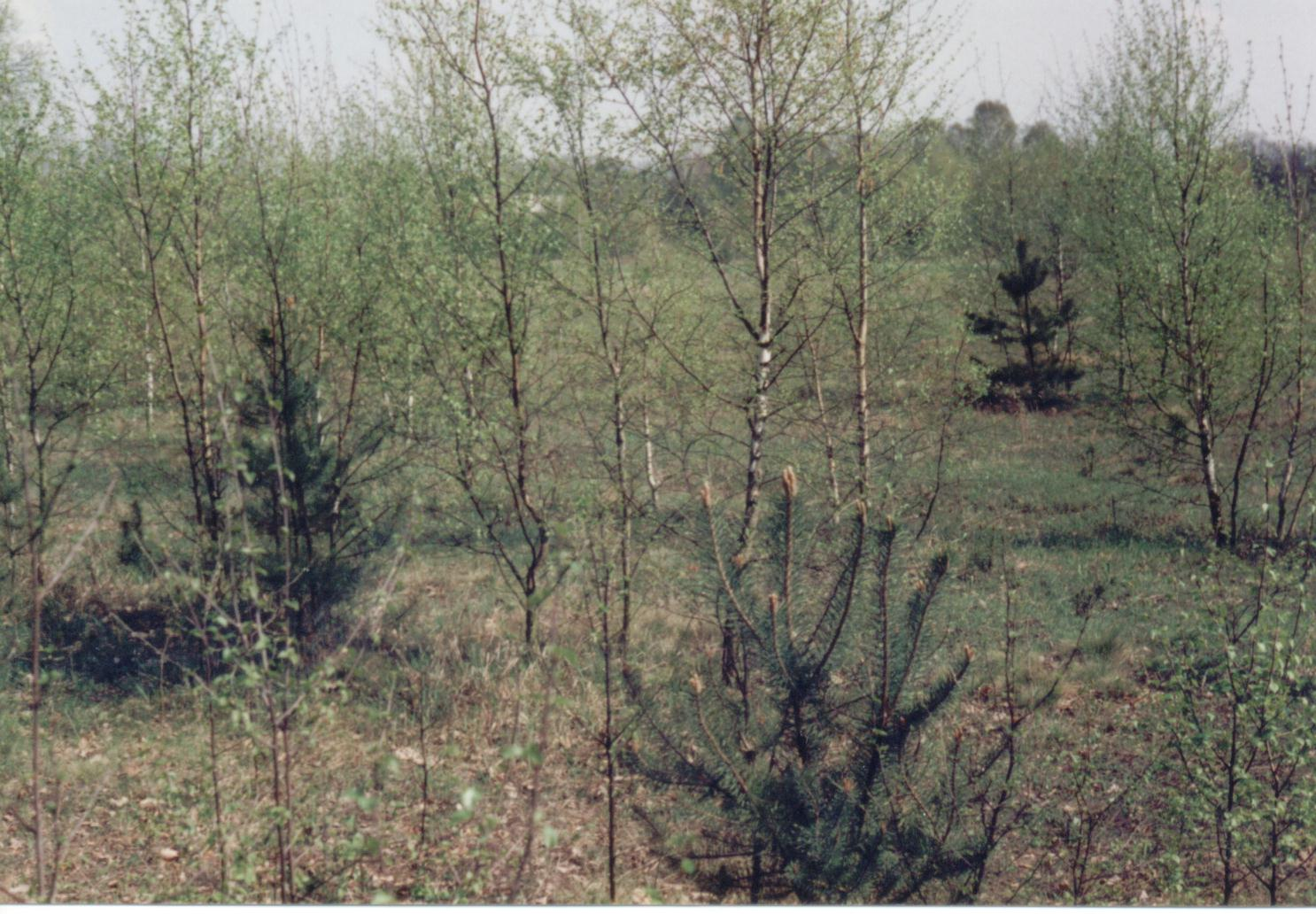 Tereny dawnych pól we wsi Raducz Former fields in village Raducz (Poland)